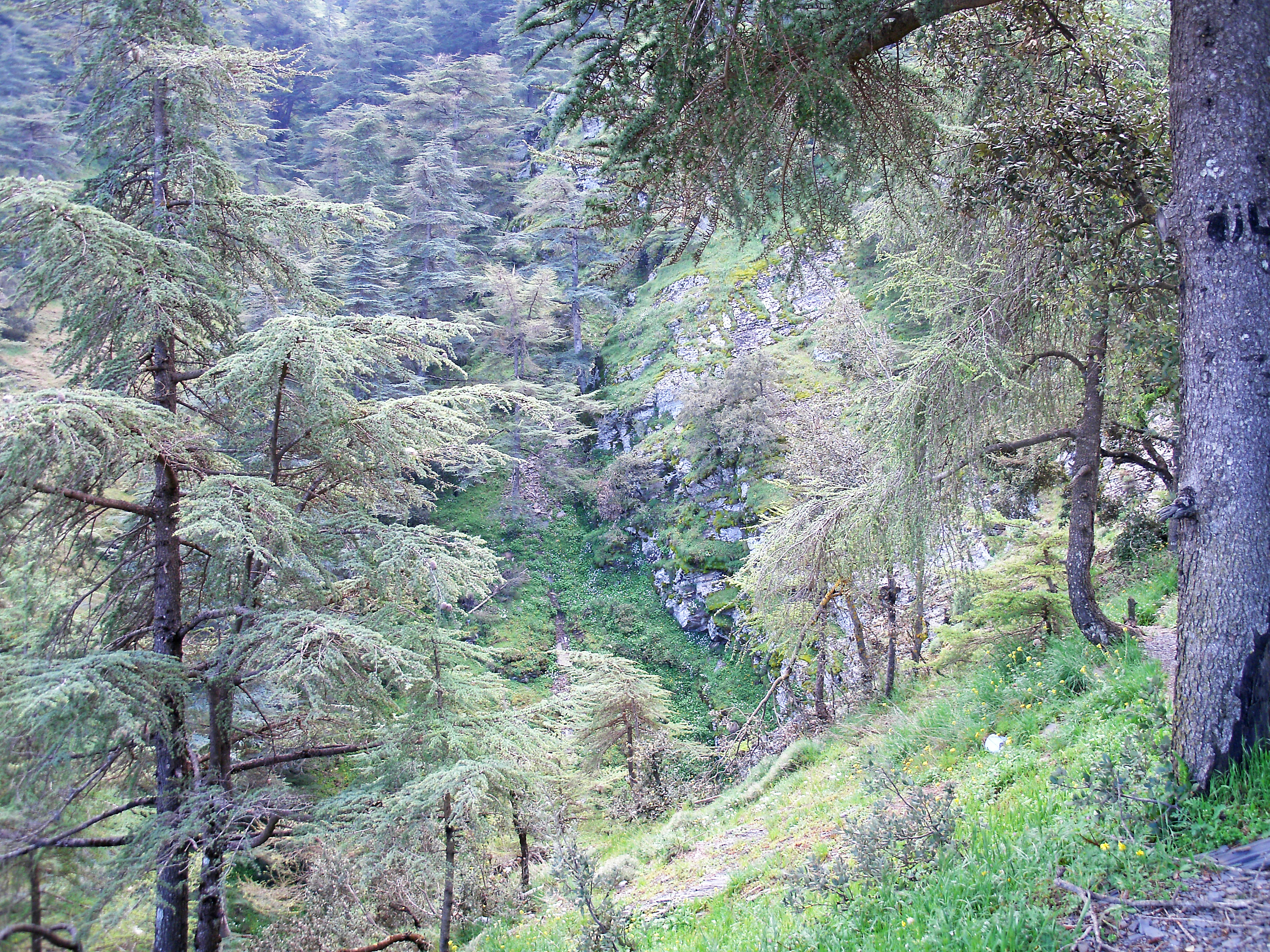 Couleurs de l'atlas blidéen (Algérie).